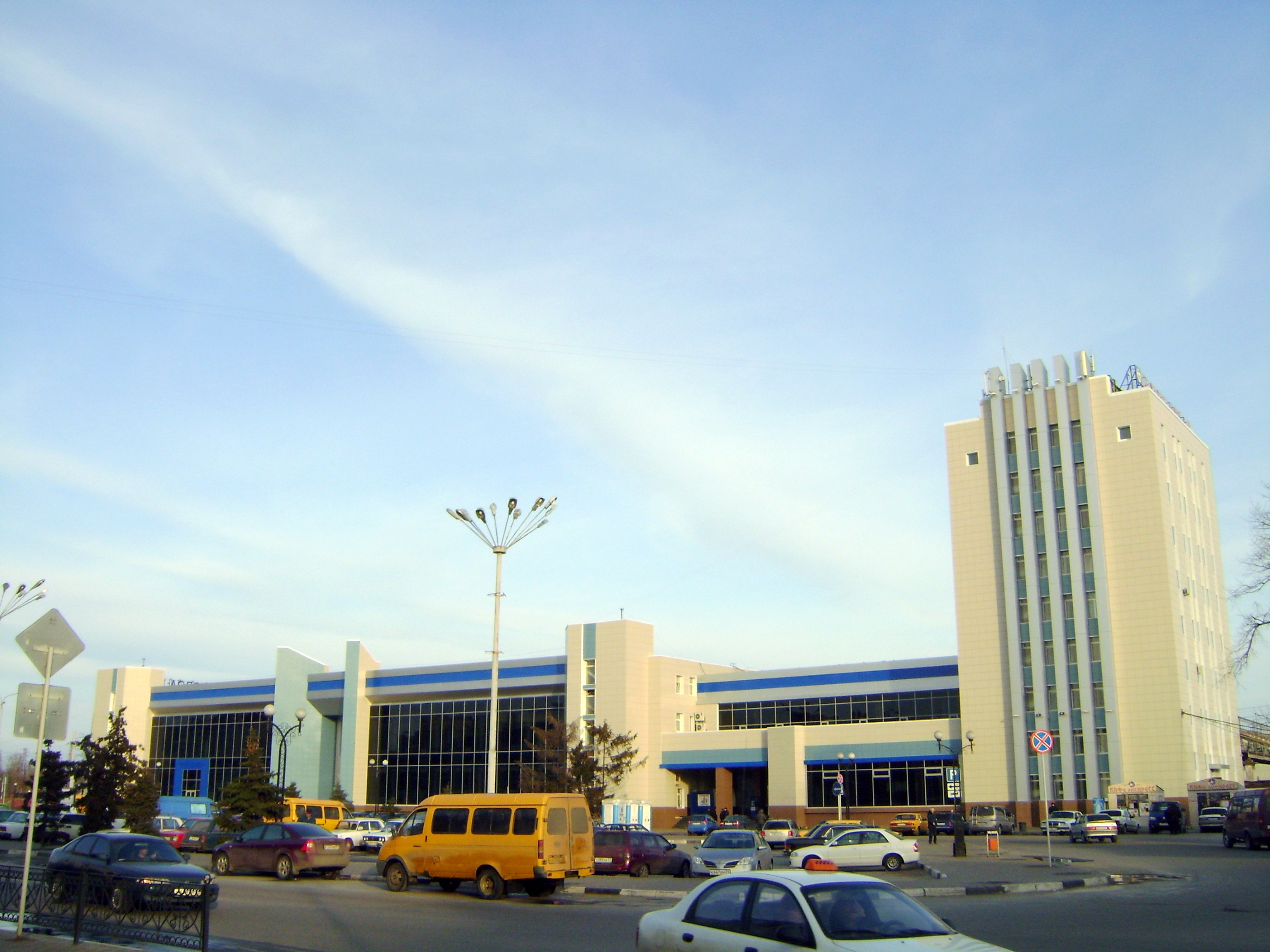 Железнодорожный вокзал Белгорода